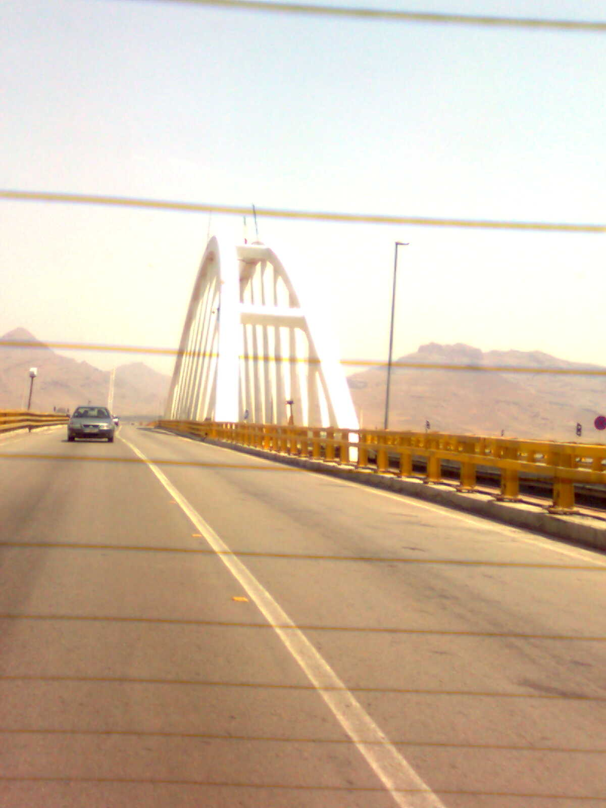 میانگزر دریاچه ارومیه